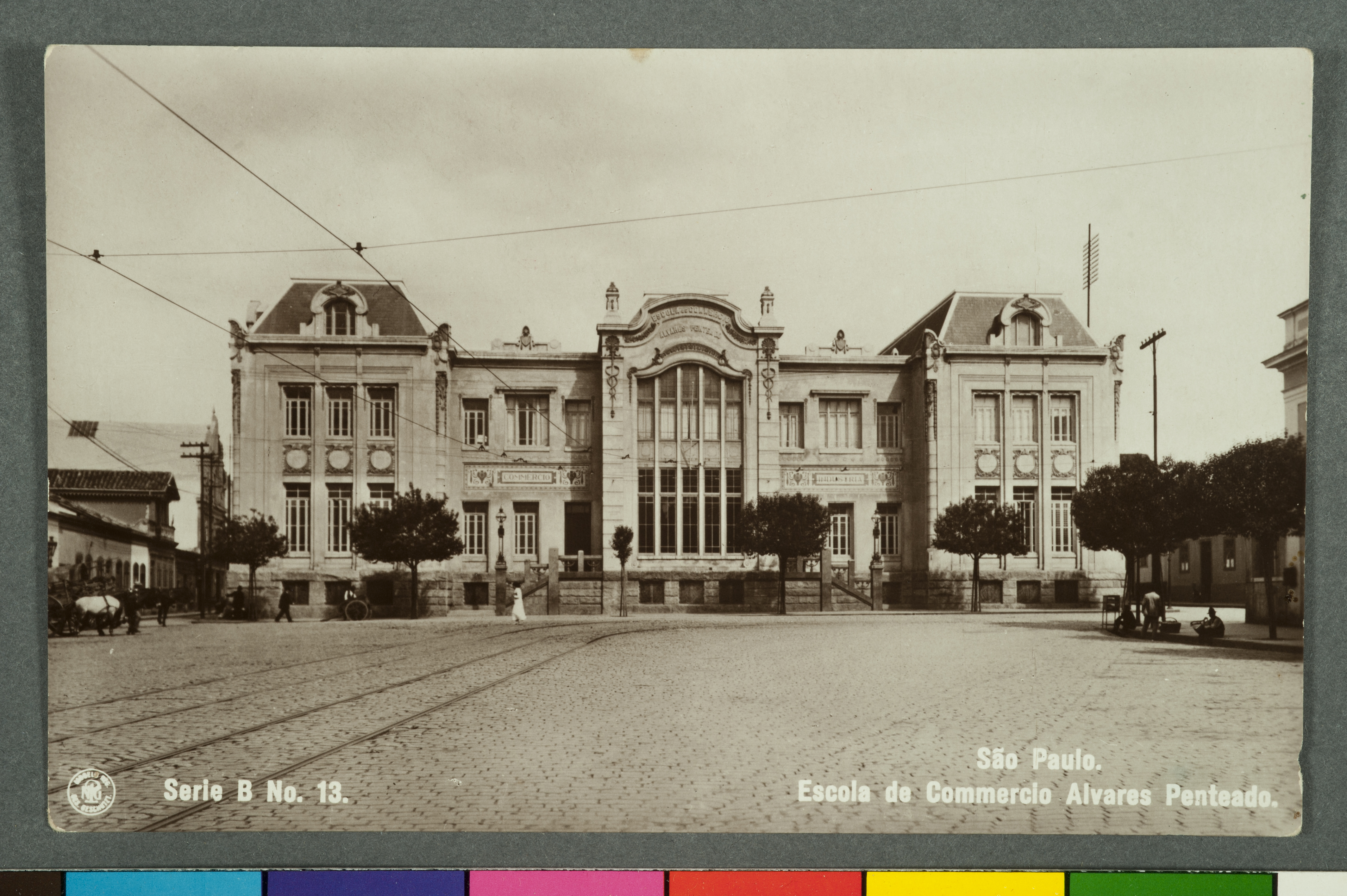 Obra que integra o acervo do Museu Paulista da USP.